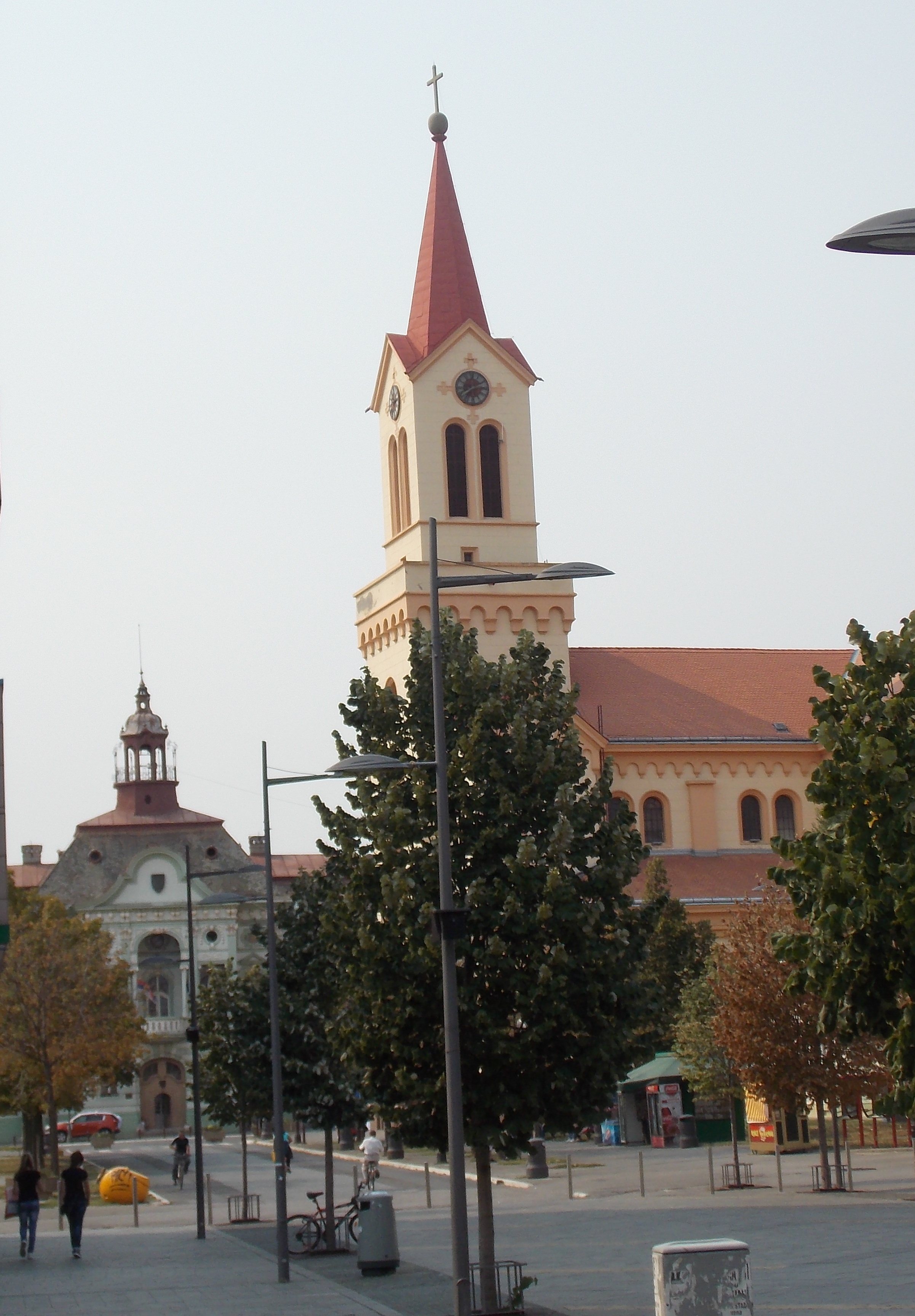 Zrenjanin, staro jezgro grada